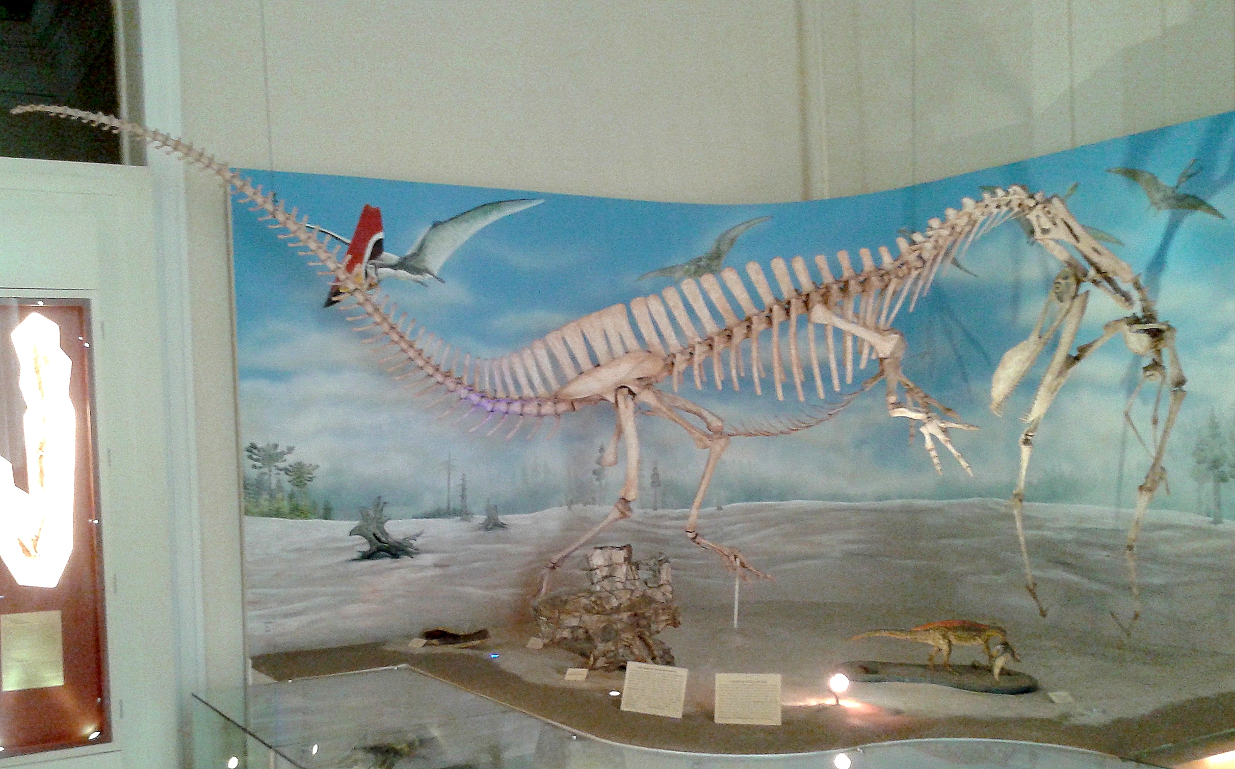 Classification: Saurischia, Spinosauridae